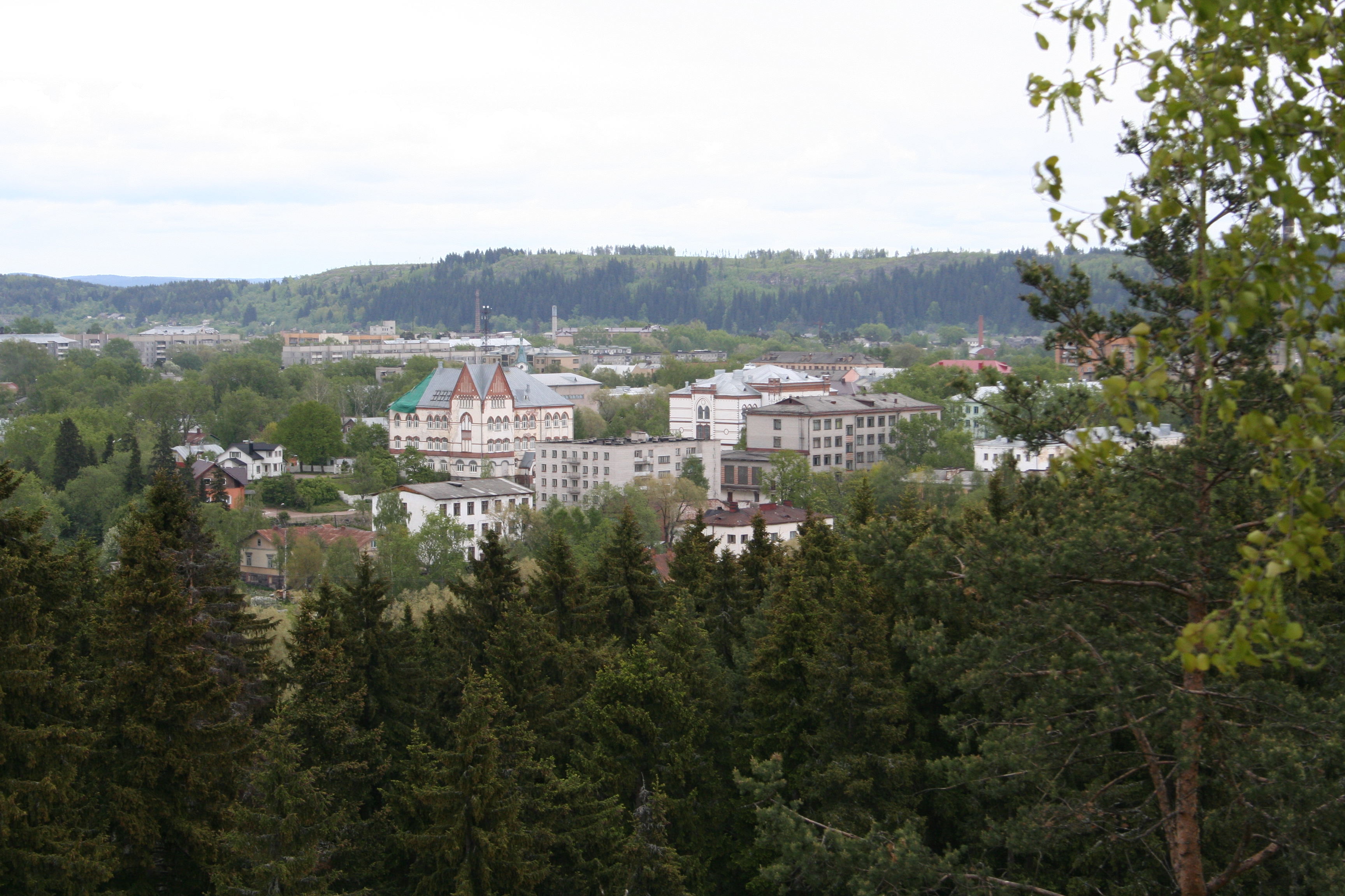 Sortavala. Wiev from Kuhavuori.